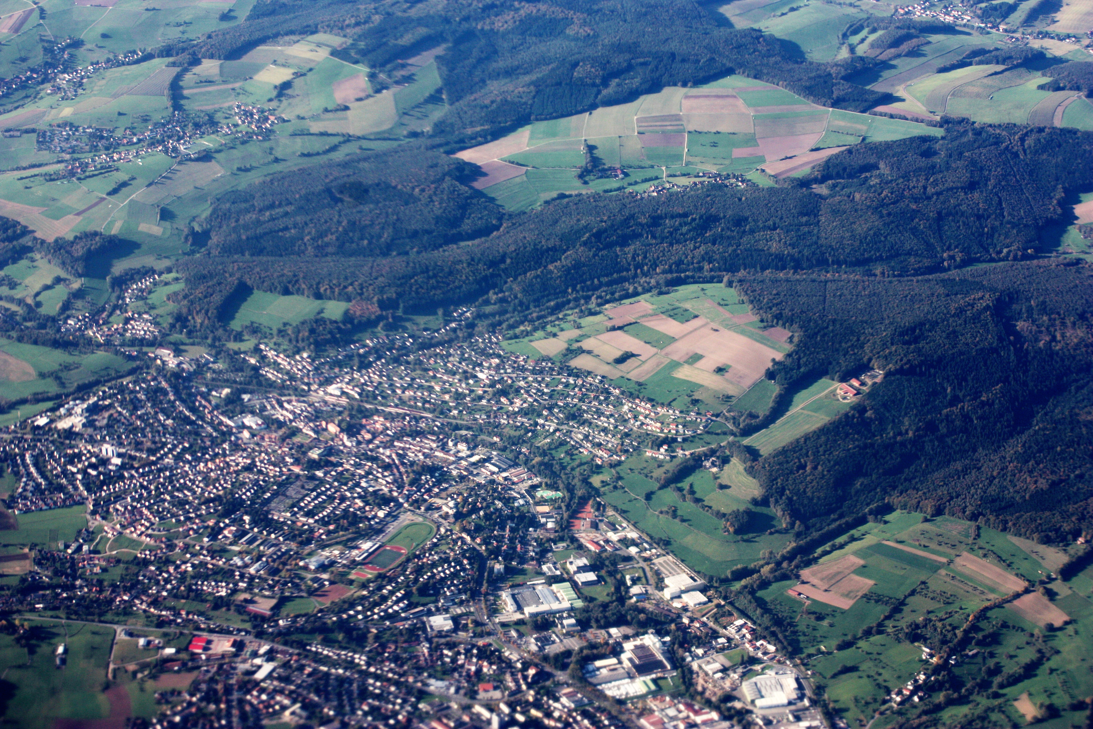 1 Flug von Frankfurt/Main nach Sofia; Start 10:12 MEZ; Landung 13:06 MEZ; Oktober 2010; Michelstadt